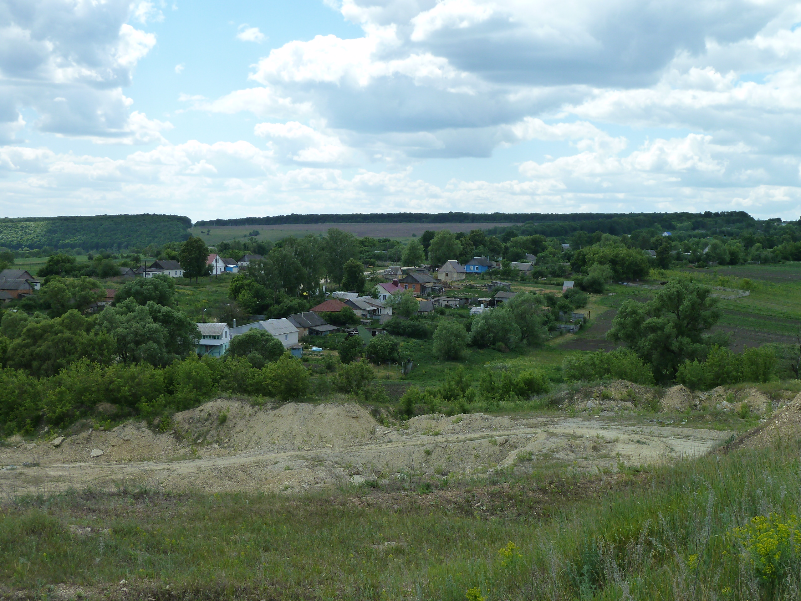 Вид с самой высокой точки Лисицыной горы на нижнюю часть деревни -- на место Мужиковского городища